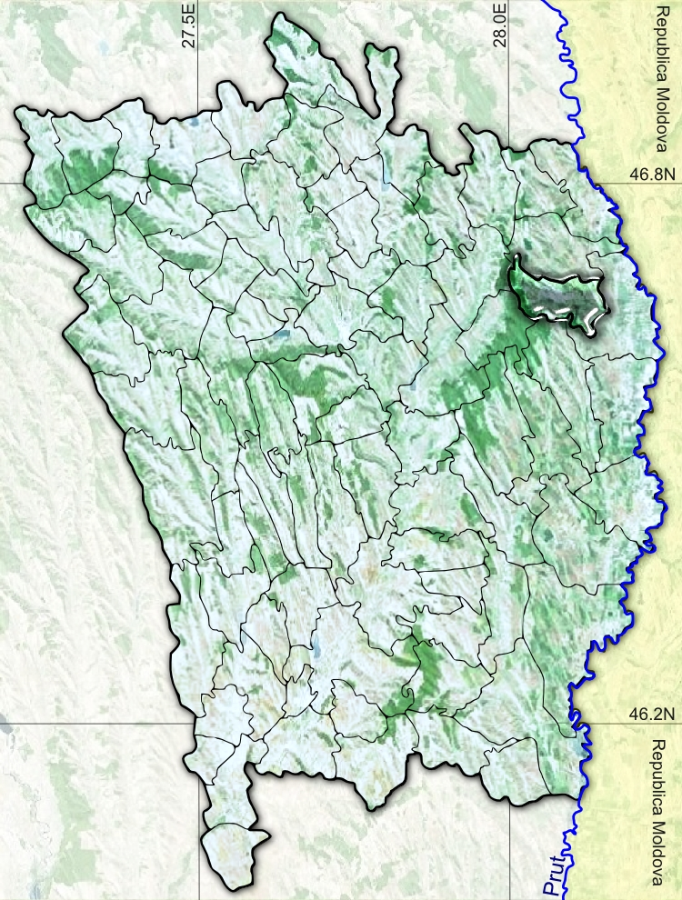 Husi jud Vaslui.